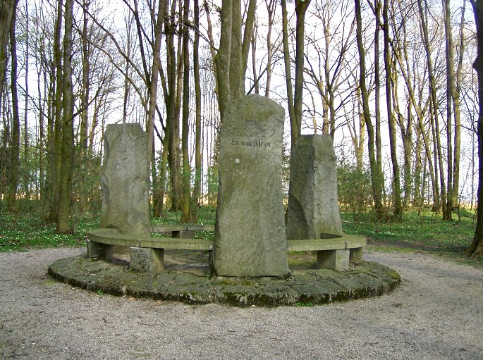 Bauernkriegsdenkmal im Emlinger Holz (Gemeinde Alkoven)